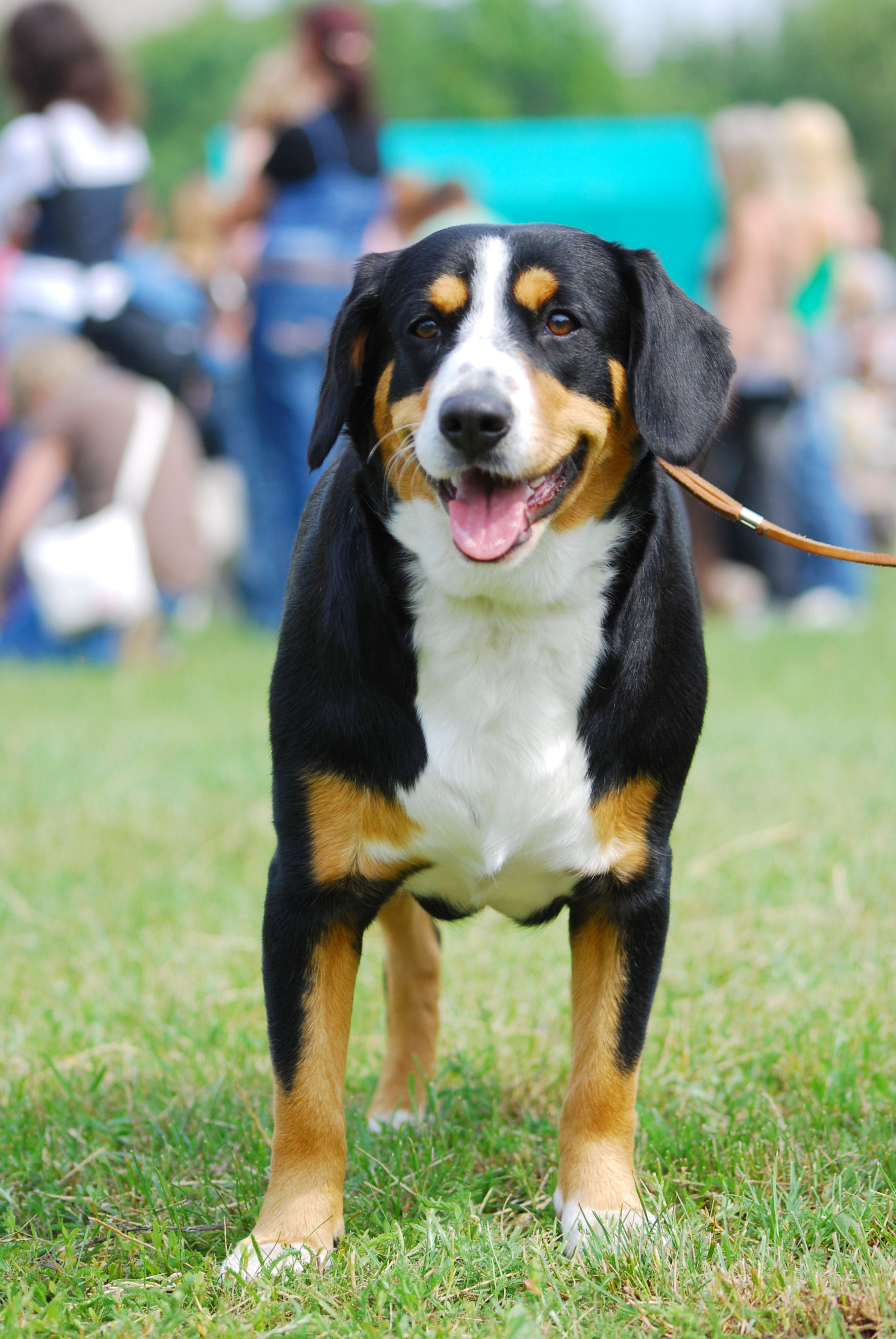 Entlebucher, XI International Dog Show in Kraków